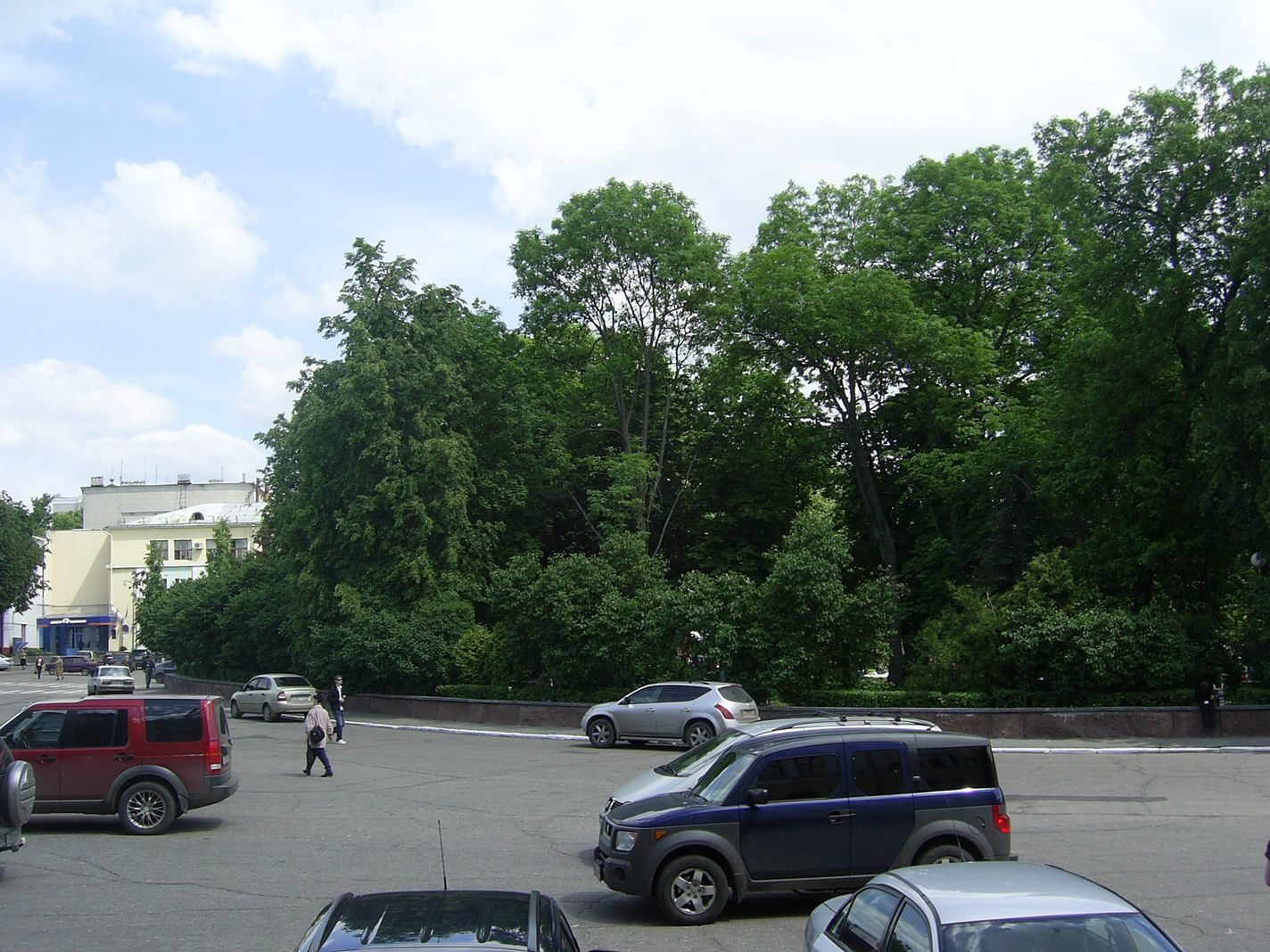 Брянск, вид на Круглый сквер